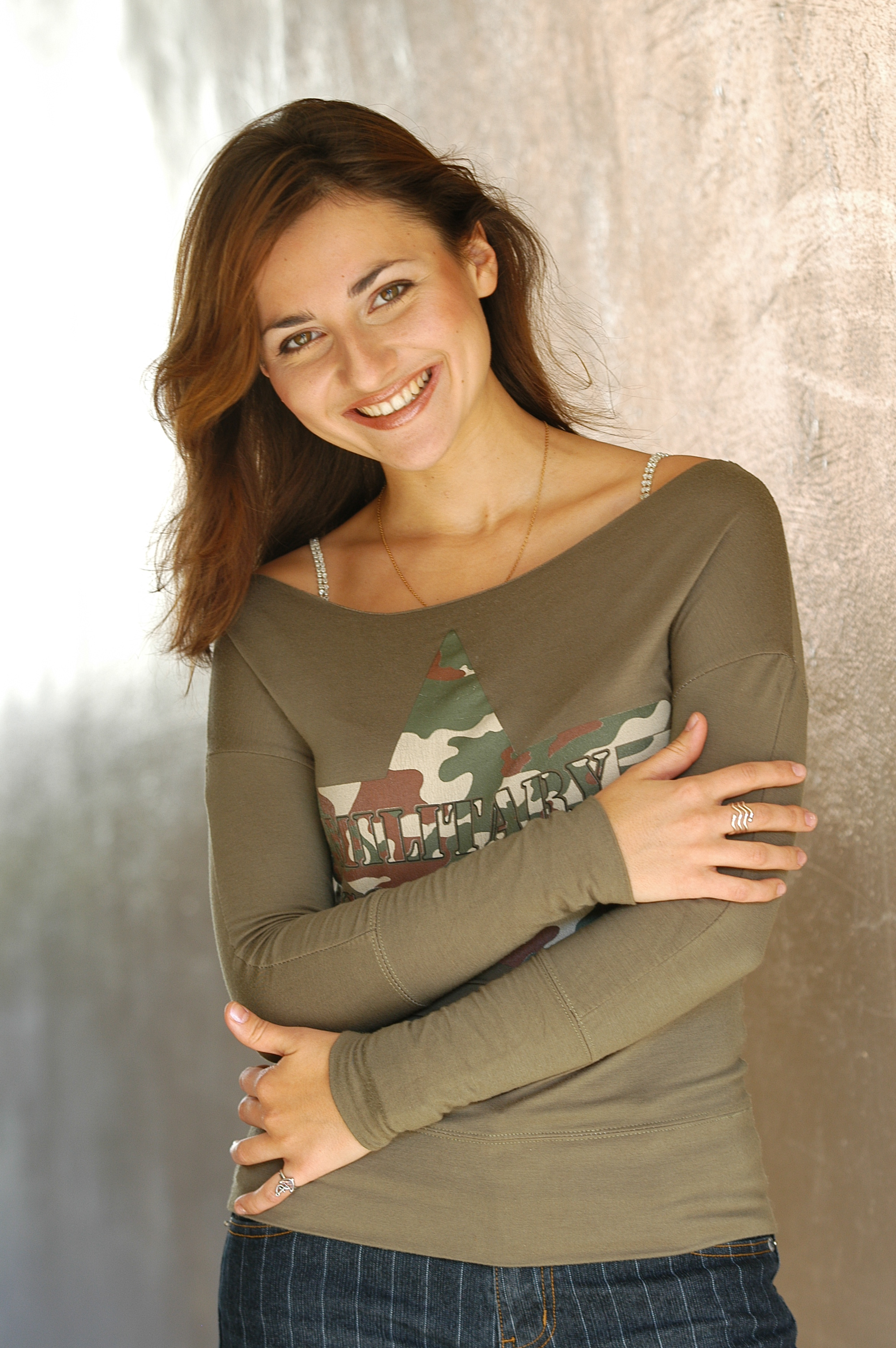 La pianiste Vera Tsybakov